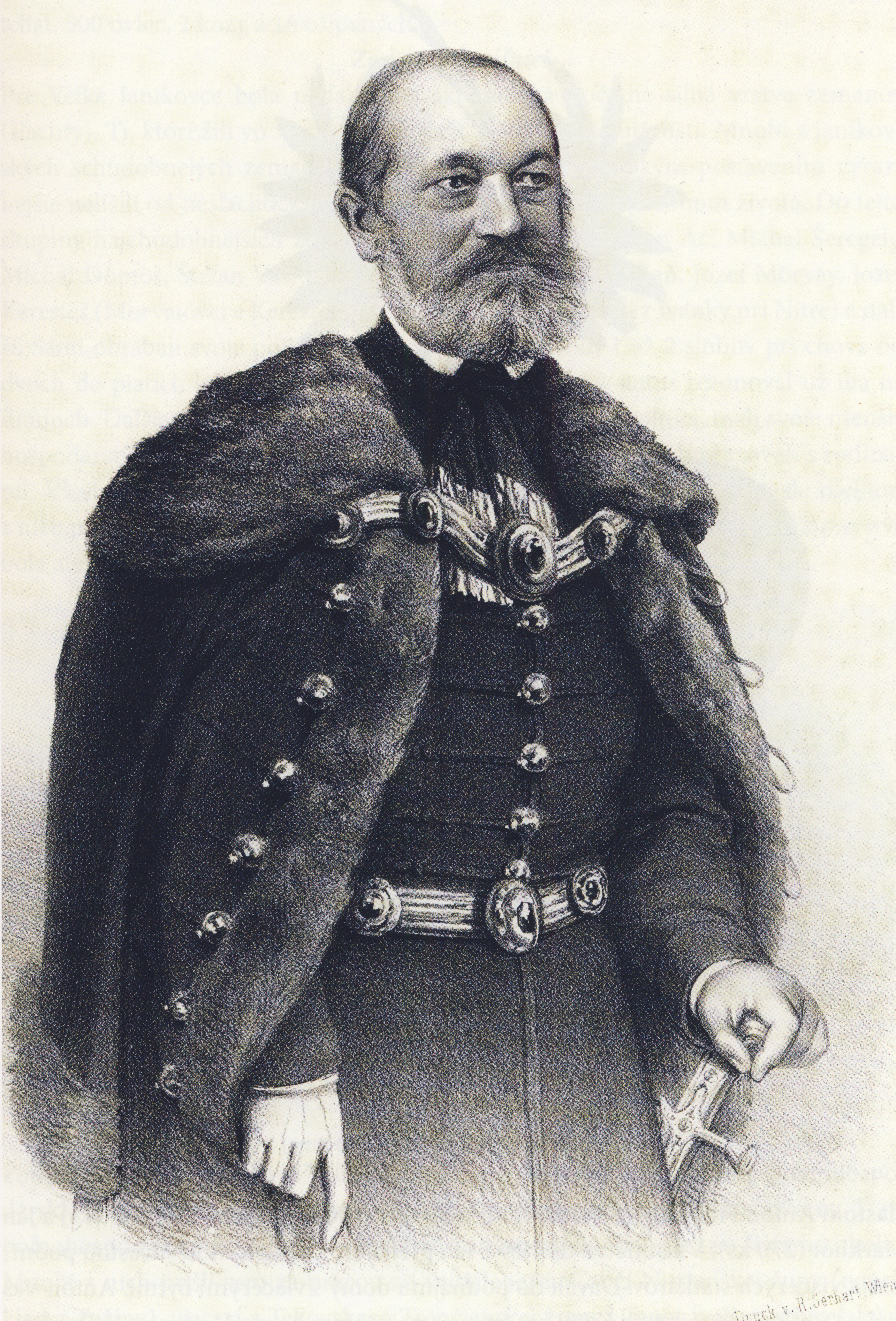 Markhot János